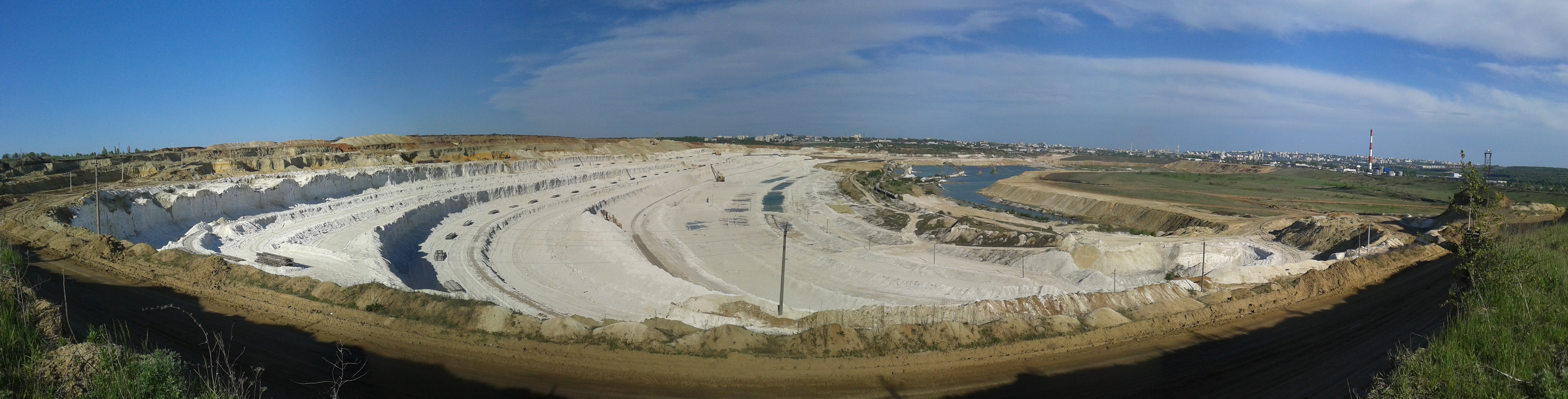 Меловой карьер Белгородского цементного завода